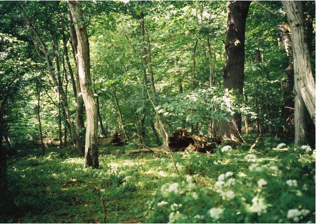 Urwald auf der Insel Vilm